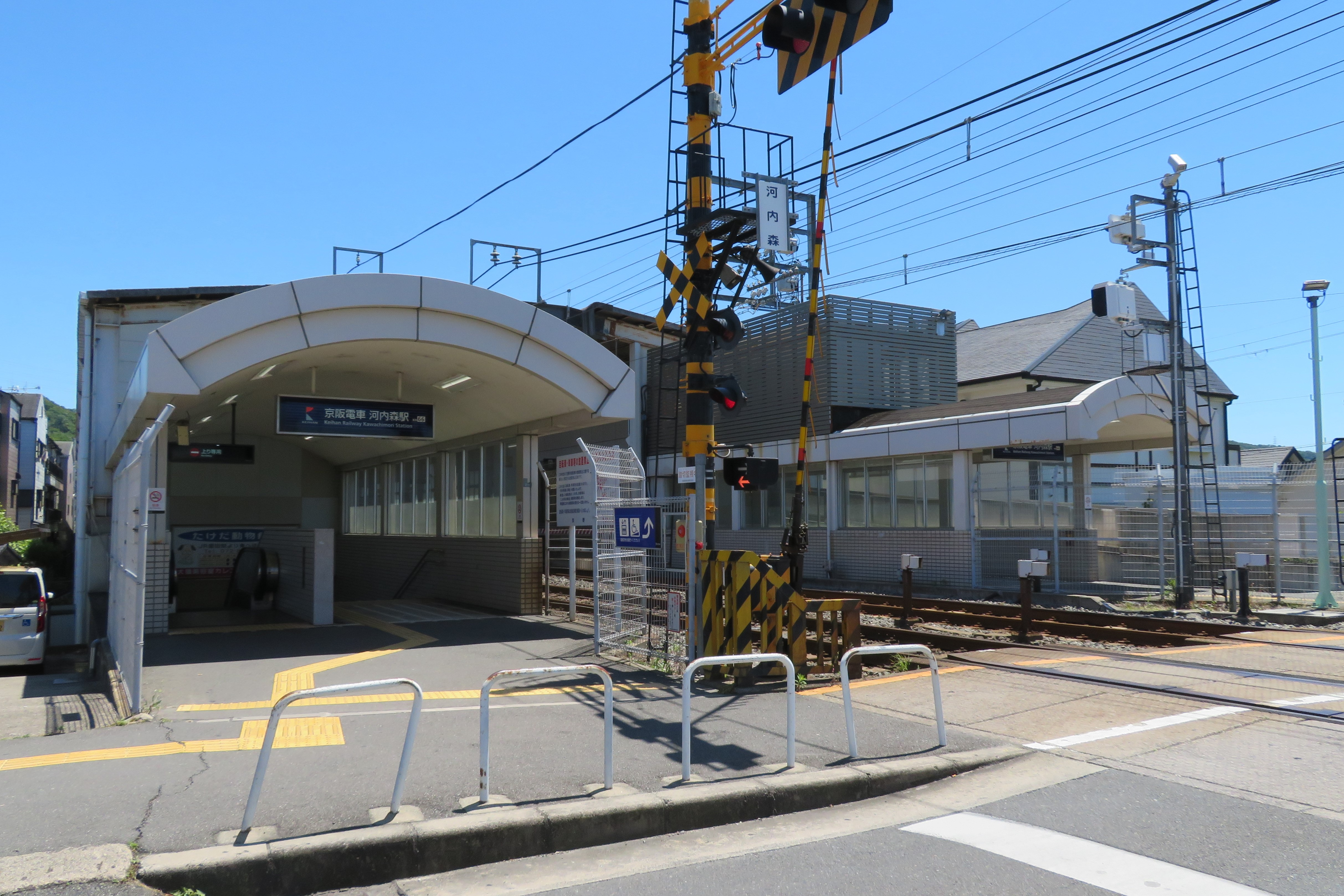 京阪電鉄河内森駅